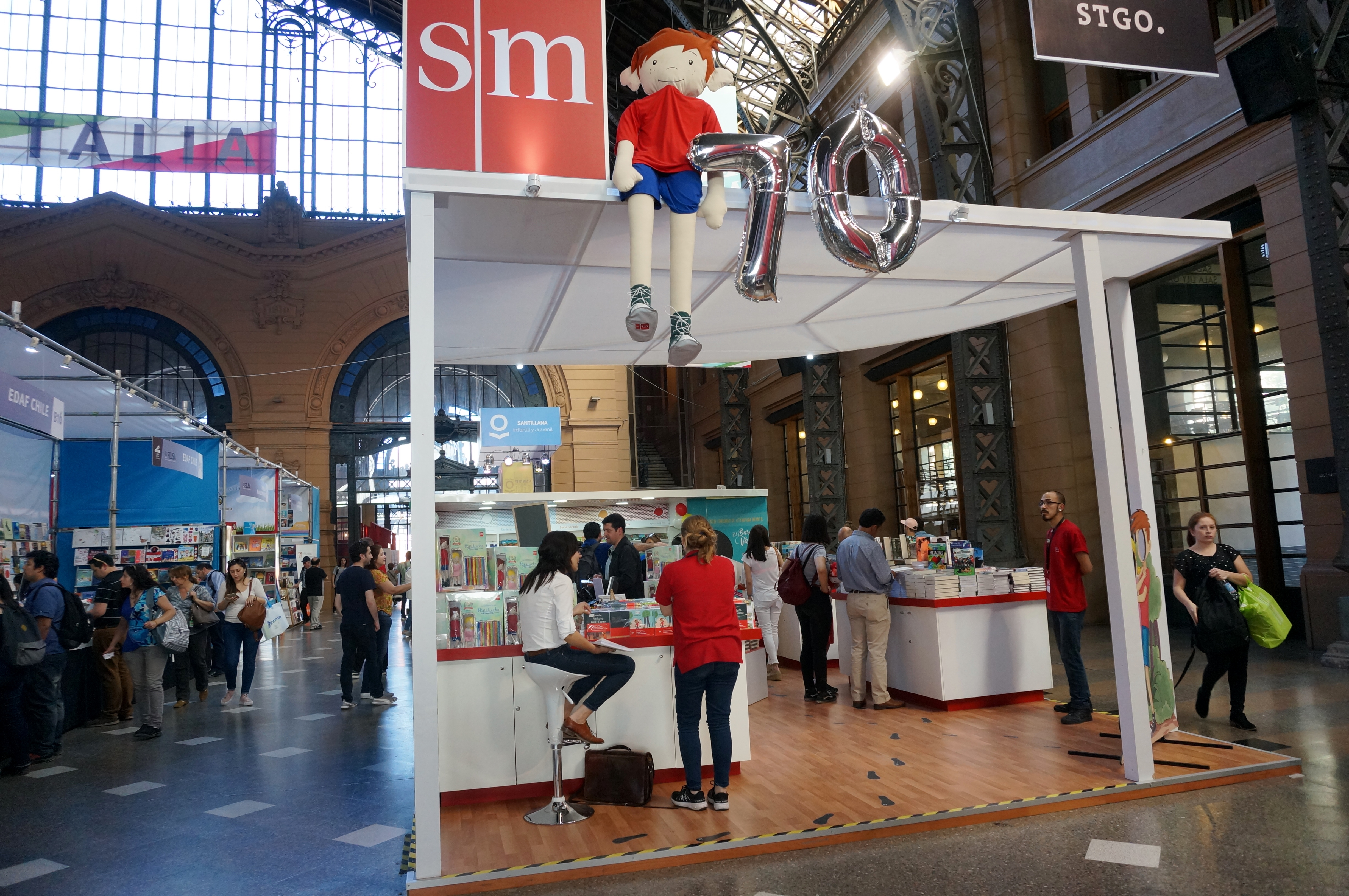 El stand de SM en la Feria Internacional del Libro de Santiago 2017. La editorial festejó en la feria los 70 años de la publicación del primer libro de Papelucho, el célebre niño de 8 años de edad que protagoniza la famosa serie creada por la escritora chilena Papelucho, Marcela Paz